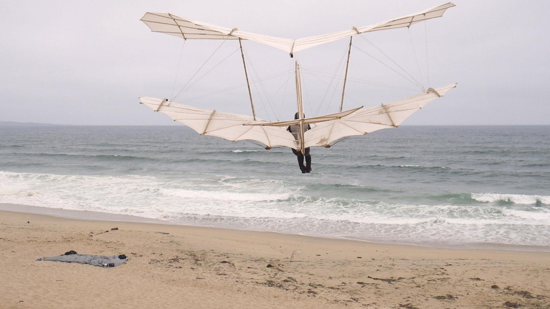 Flug des Lilienthal Doppeldeckers Der Doppeldecker war im Otto-Lilienthal-Museum in Anklam aus authentischen Materialien (Weidenruten, Hanfseil, Shirting und Stahldraht) nach erhaltenen Plänen Lilienthals und Stoffanalysen erhalten gebliebener Gleiter gebaut worden. Der Doppeldecker wurde im Laufe des Jahres bei Schleppversuchen an einer Seilwinde getestet. Die dabei ermittelten Flugeigenschaften dienten der Einstellung der Seillängen mittels Spannschlössern, die Otto Lilienthal extra für diesen Zweck entwickelt hatte. Die Flugversuche fanden zwischen dem 21. und 30. Juli 2019 an der Pazifikküste Kaliforniens nahe der Stadt Monterey statt, wo konstant günstige Windbedingungen herrschen. (Textquelle